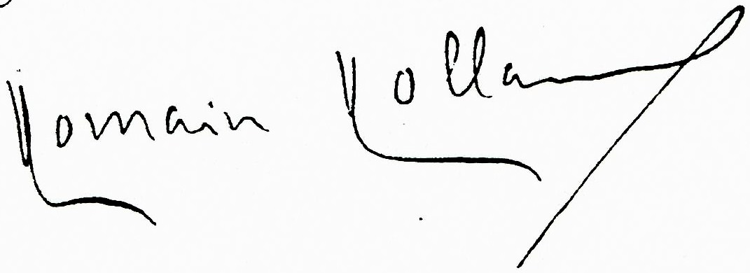 Signature de l'écrivain français Romain Rolland. Scan d'après correspondance. Cette image ou le texte qui y est représenté est seulement composé de formes géométriques simples et de texte. Elle n’atteint pas le seuil d'originalité nécessaire pour la protection du droit d’auteur, et est donc du domaine public.